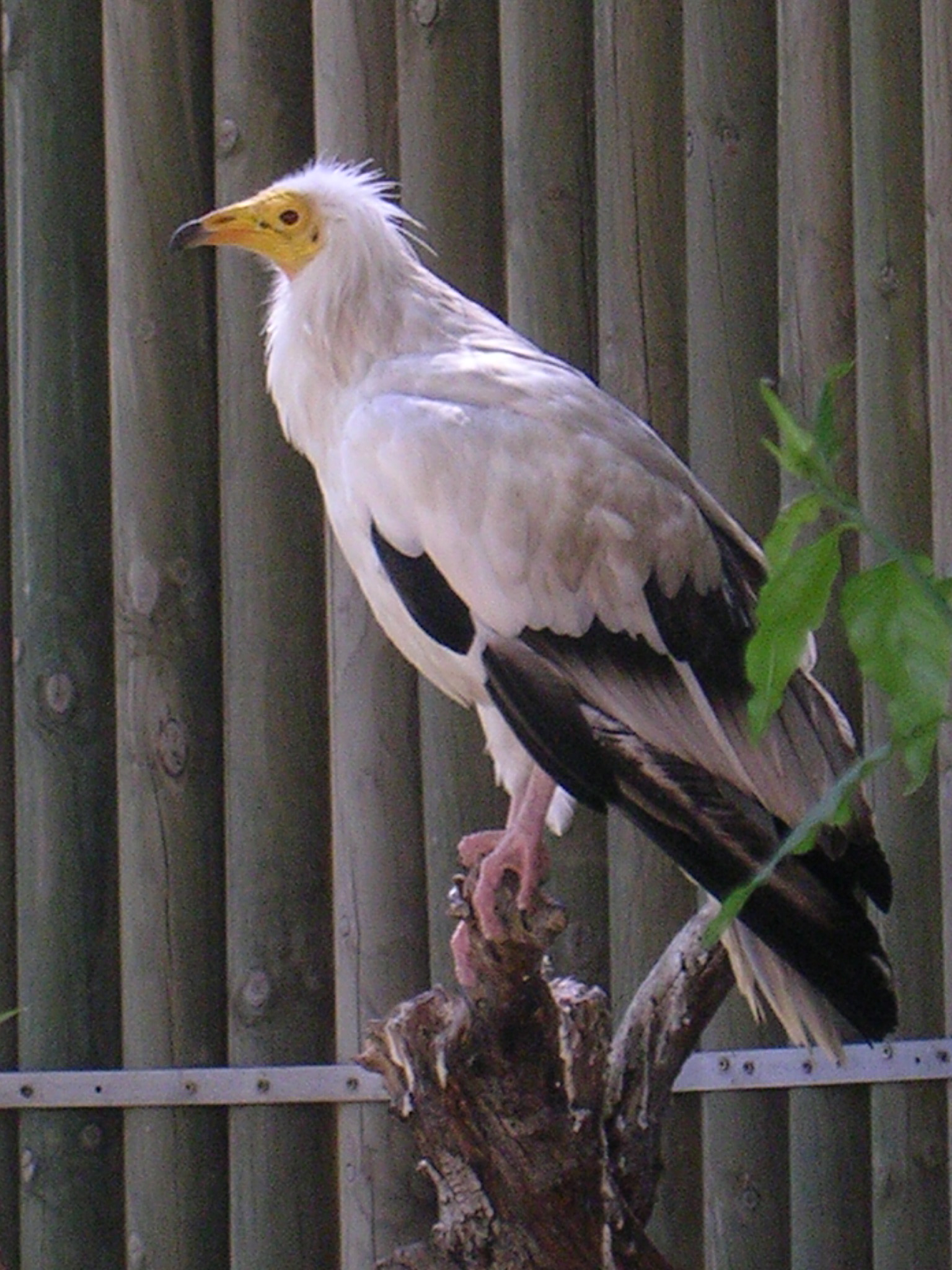 Alimoche adulto, Buitres en el Zoo de Barcelona